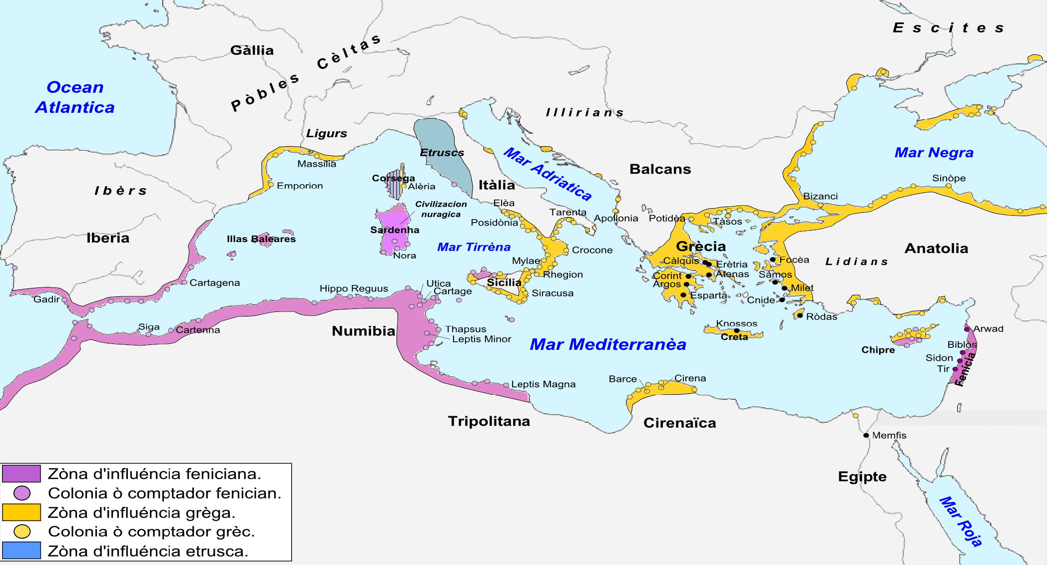 Colonizacion antica de Mediterranèa per lei Fenicians, lei Grècs e leis Etruscs.